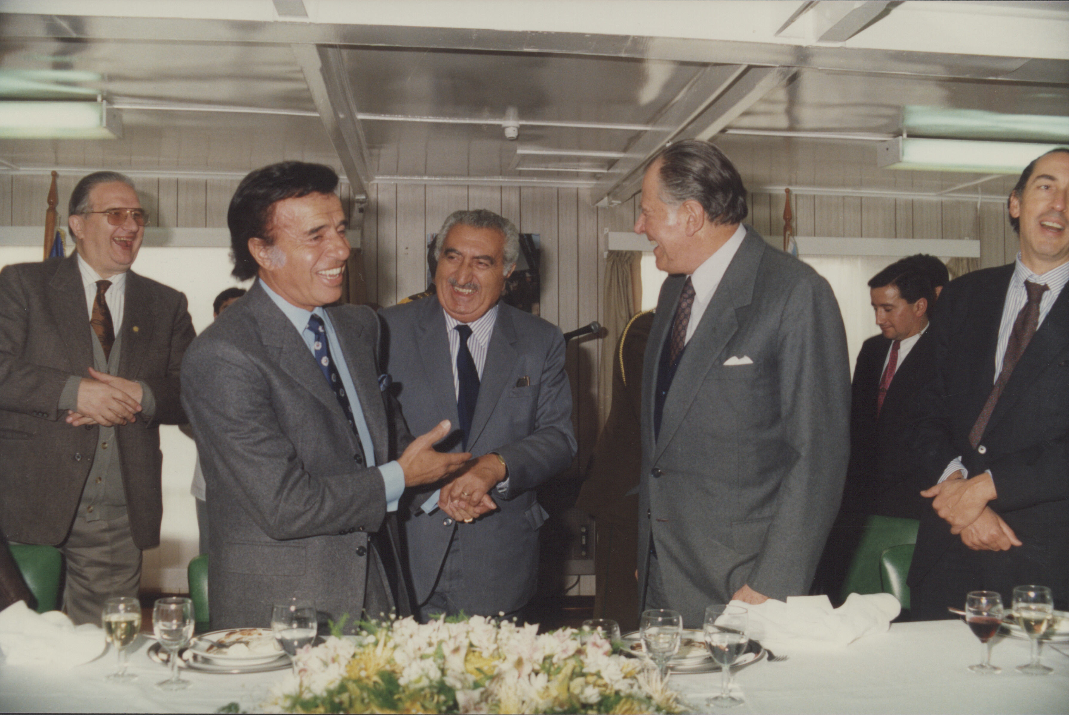 Encuentro en Magallanes entre el Presidente Patricio Aylwin Azócar con el Presidente de Argentina Carlos Saúl Menem, ambos junto a Alejandro Hales Jamarne, ministro de Minería. 28 Abril 1993